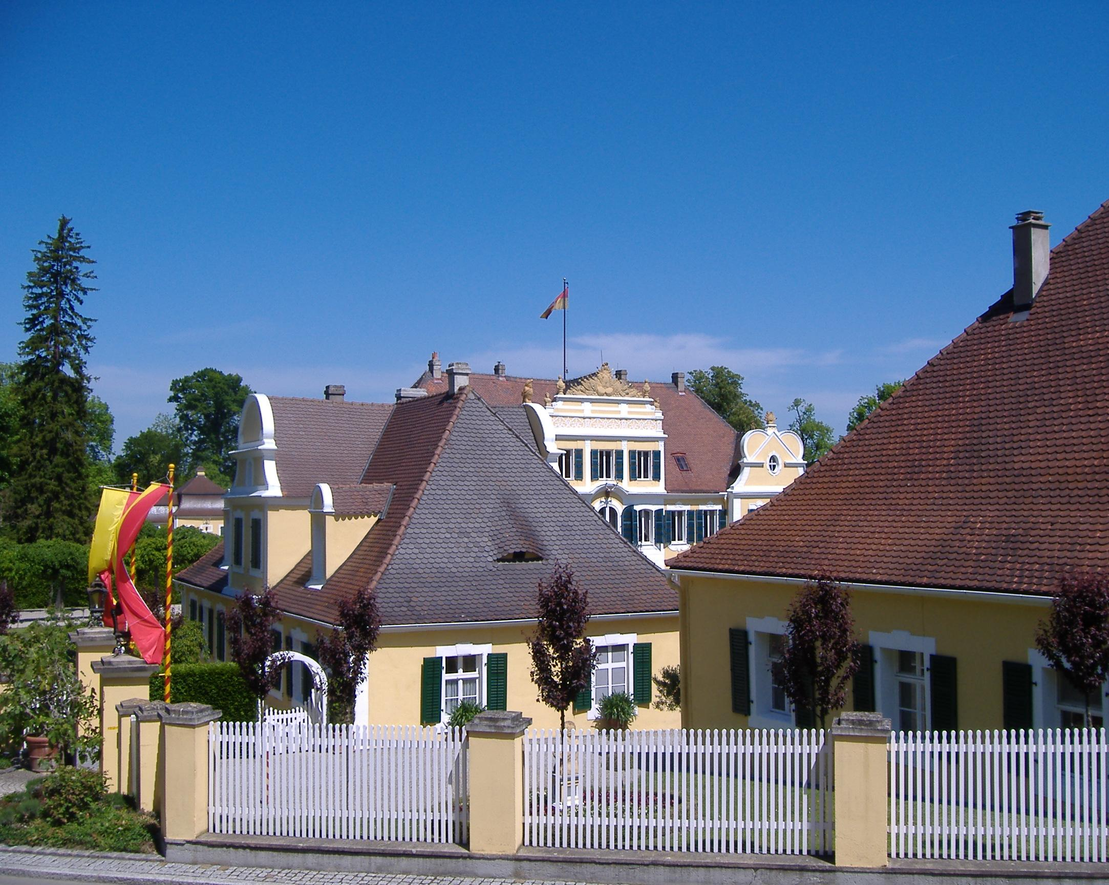 Schloss Hohenaltheim Südseite